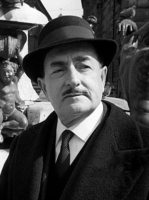 Salvatore Quasimodo in Italy